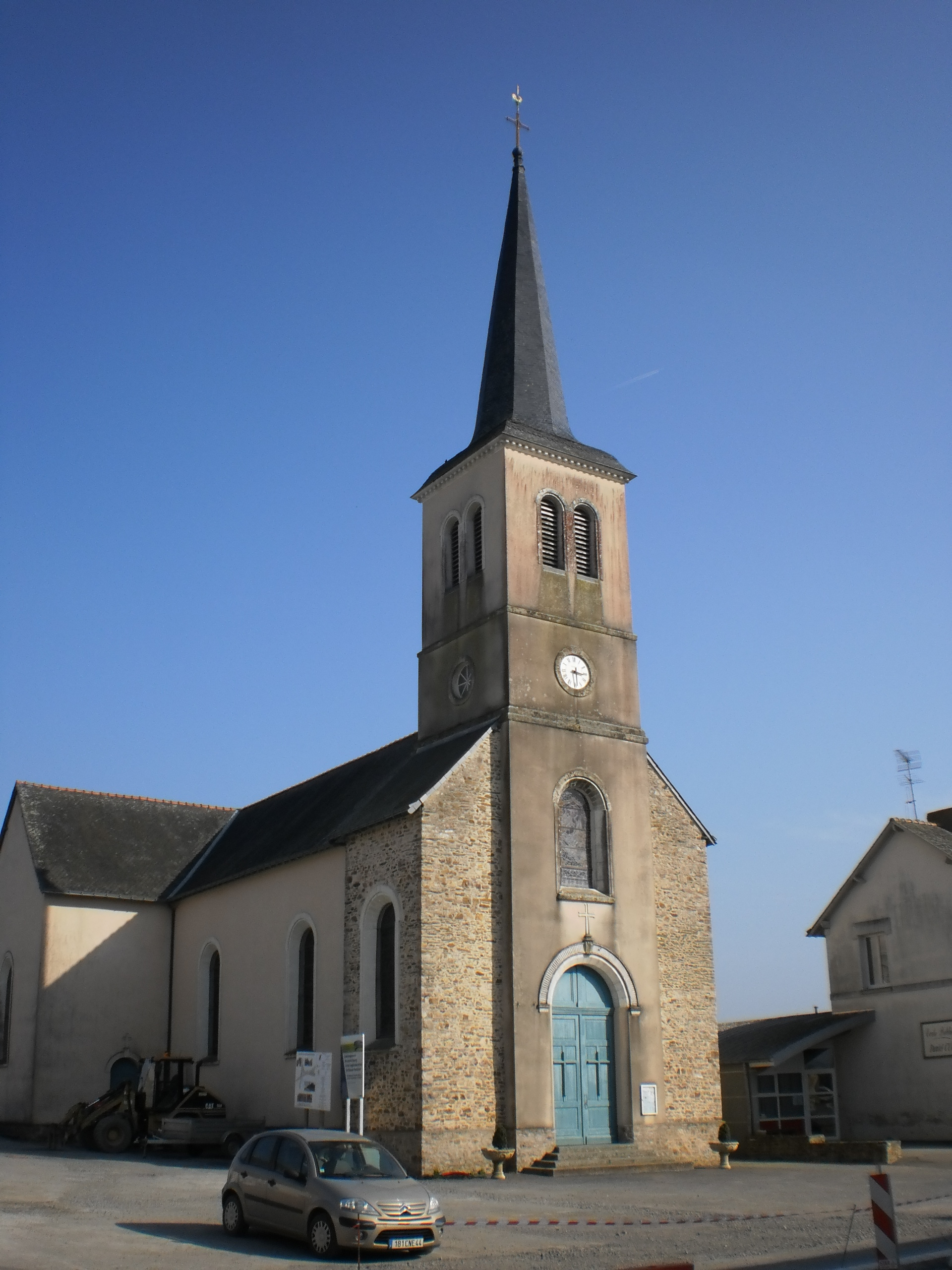 Soulvache (Loire-Atlantique, France) - l'église